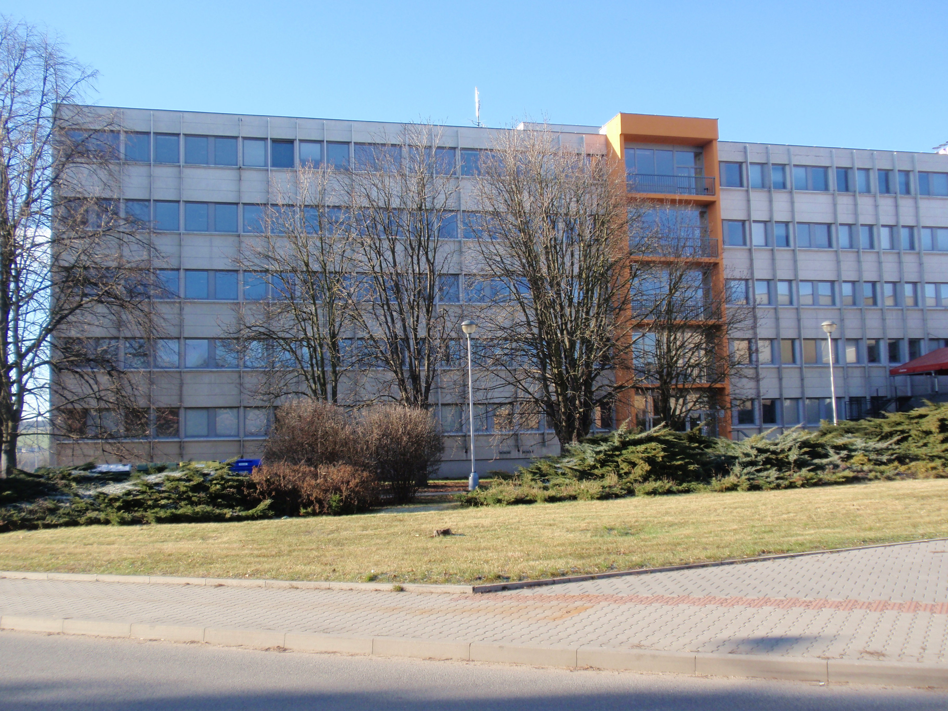 Dědice, areál vojenských škol v Dědicích, Kasárna Dědice